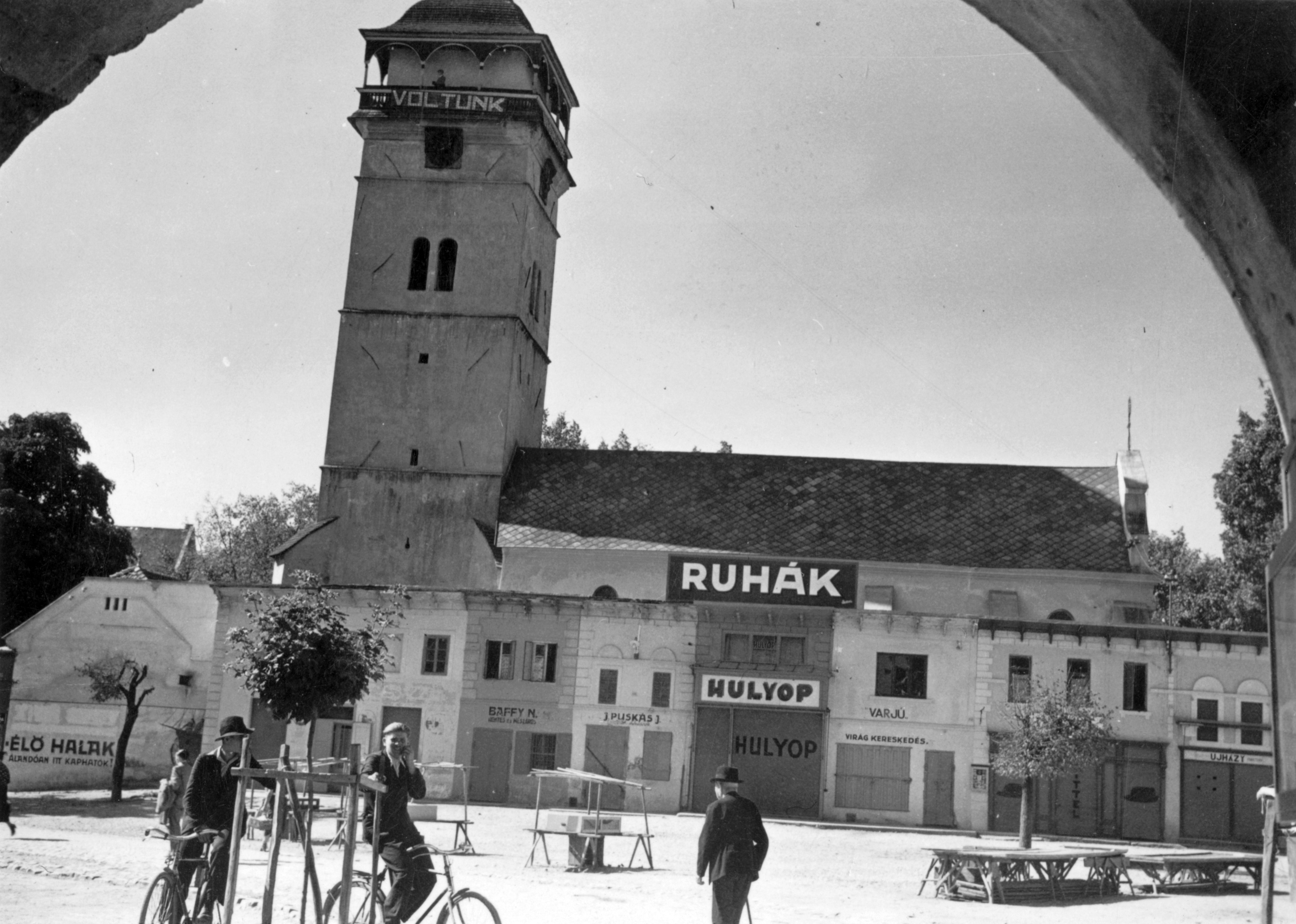 főtér. Location: Slovakia, Roznava Tags: tie, billboard Title: főtér.